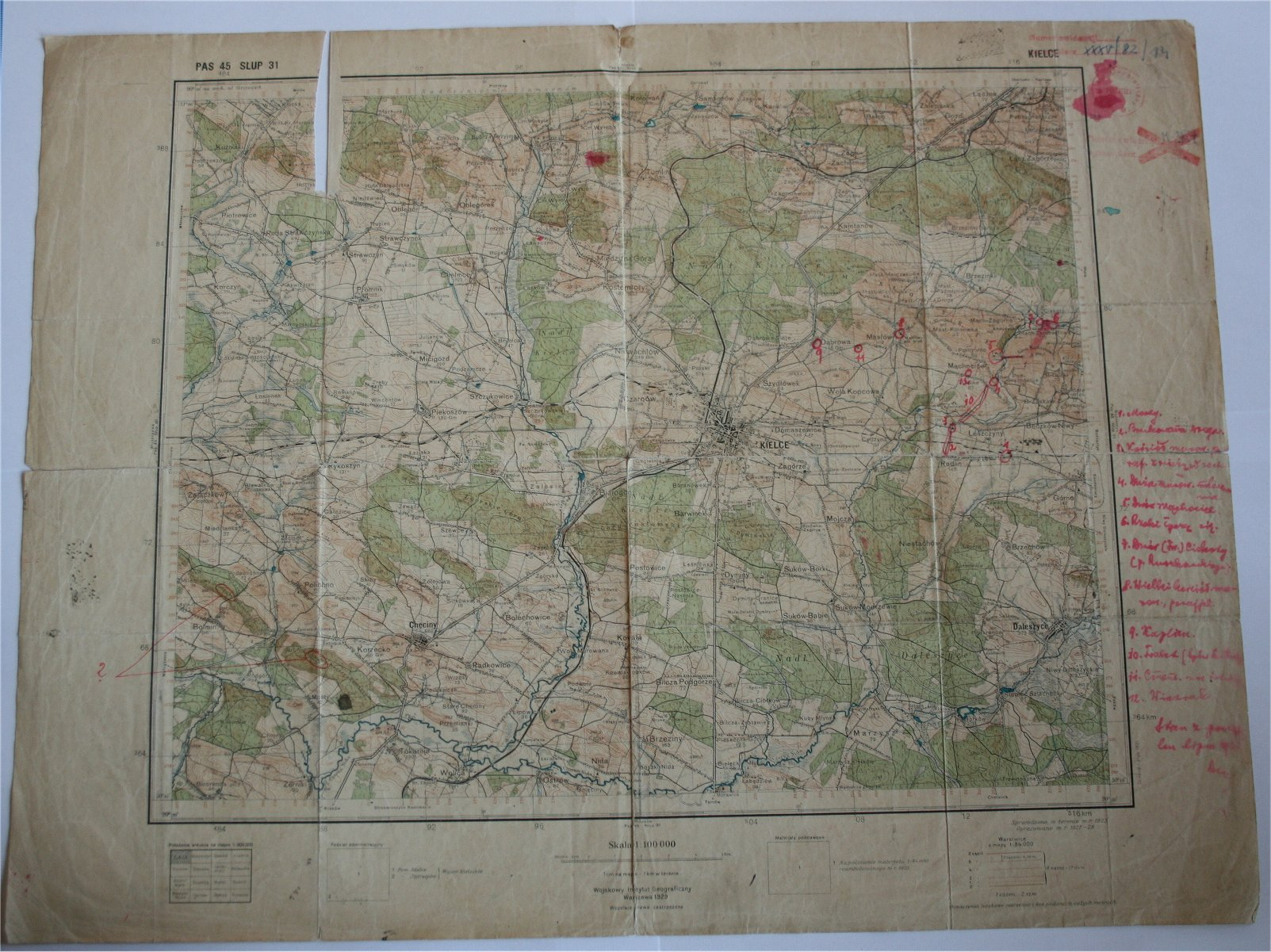 WIG - redakcyjna wersja mapy KIELCE - przydział Dr. Deszczka Władysław 10. Grudzień. 1934. Zbiory prywatne WARSZAWA.